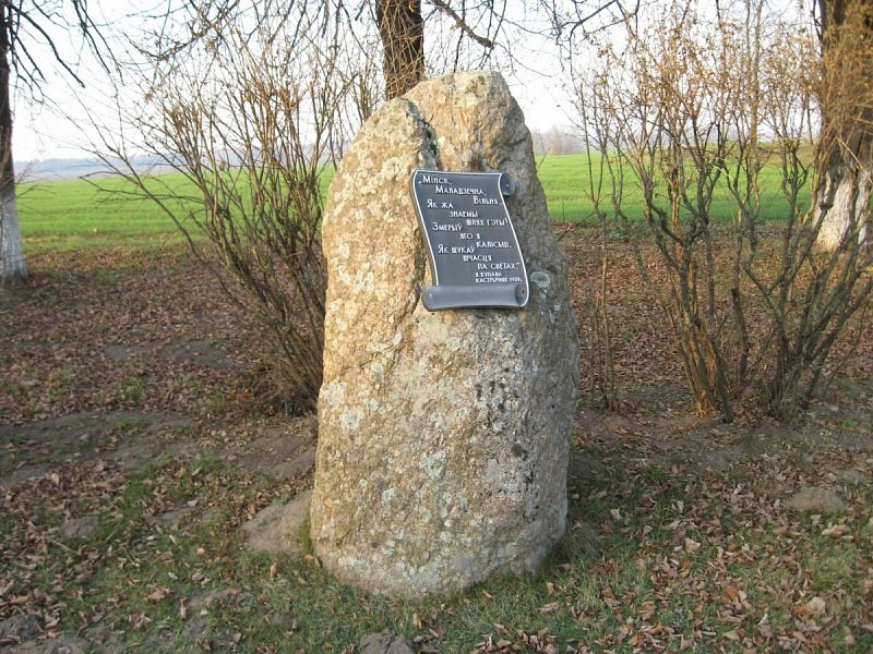 Мясата. Помнік Віленскаму тракту